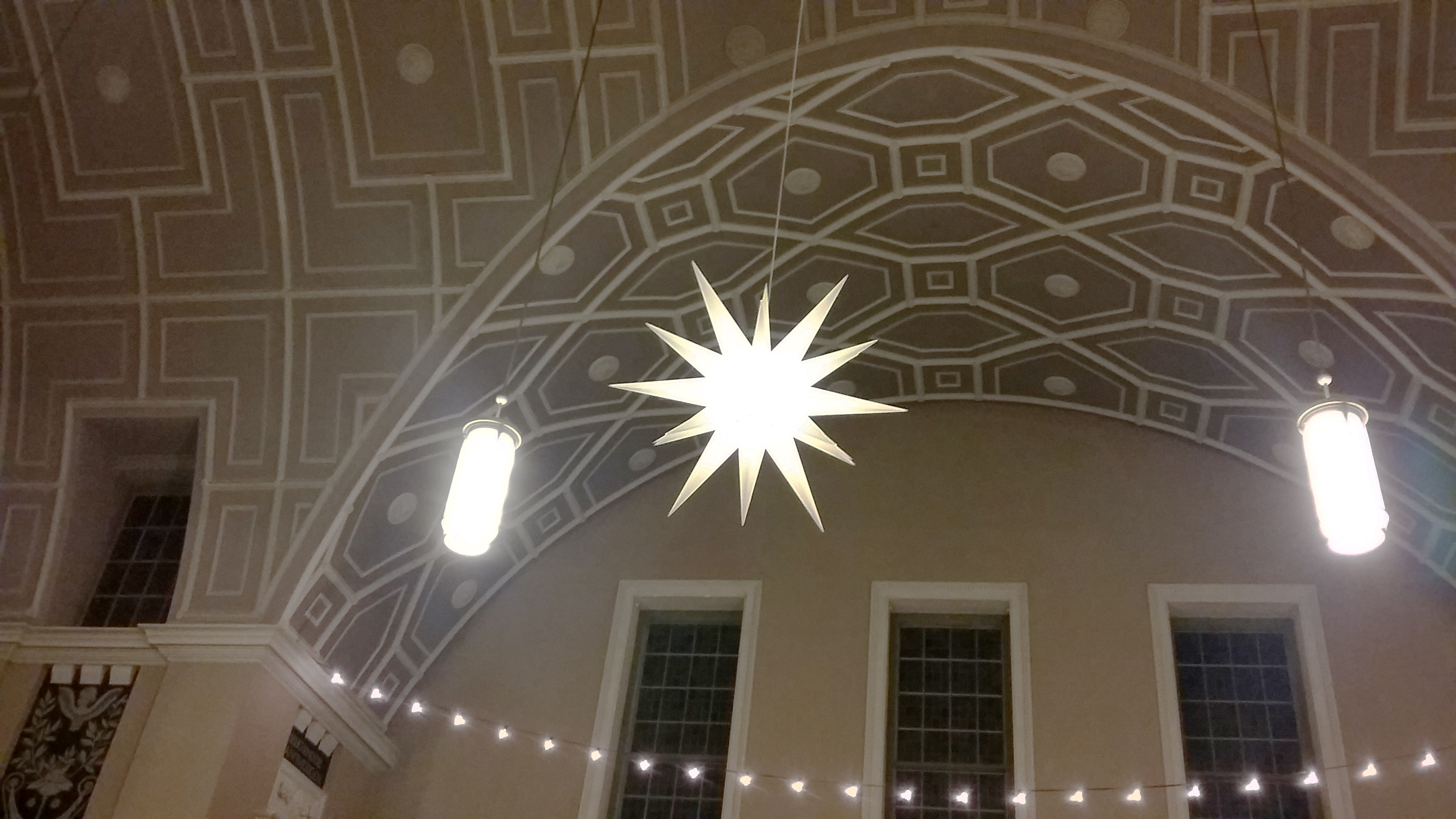 Hoffnungskirche Pankow Gewölbe